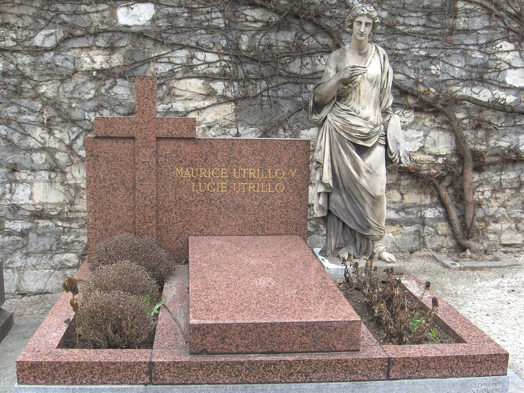 Maurice Utrillo – Tombe / Grave – Cimetière Saint Vincent de / Cemetery Saint Vincent to : Montmartre – Paris (France) – Date 19/04/2006 – Auteur / Author : Airair